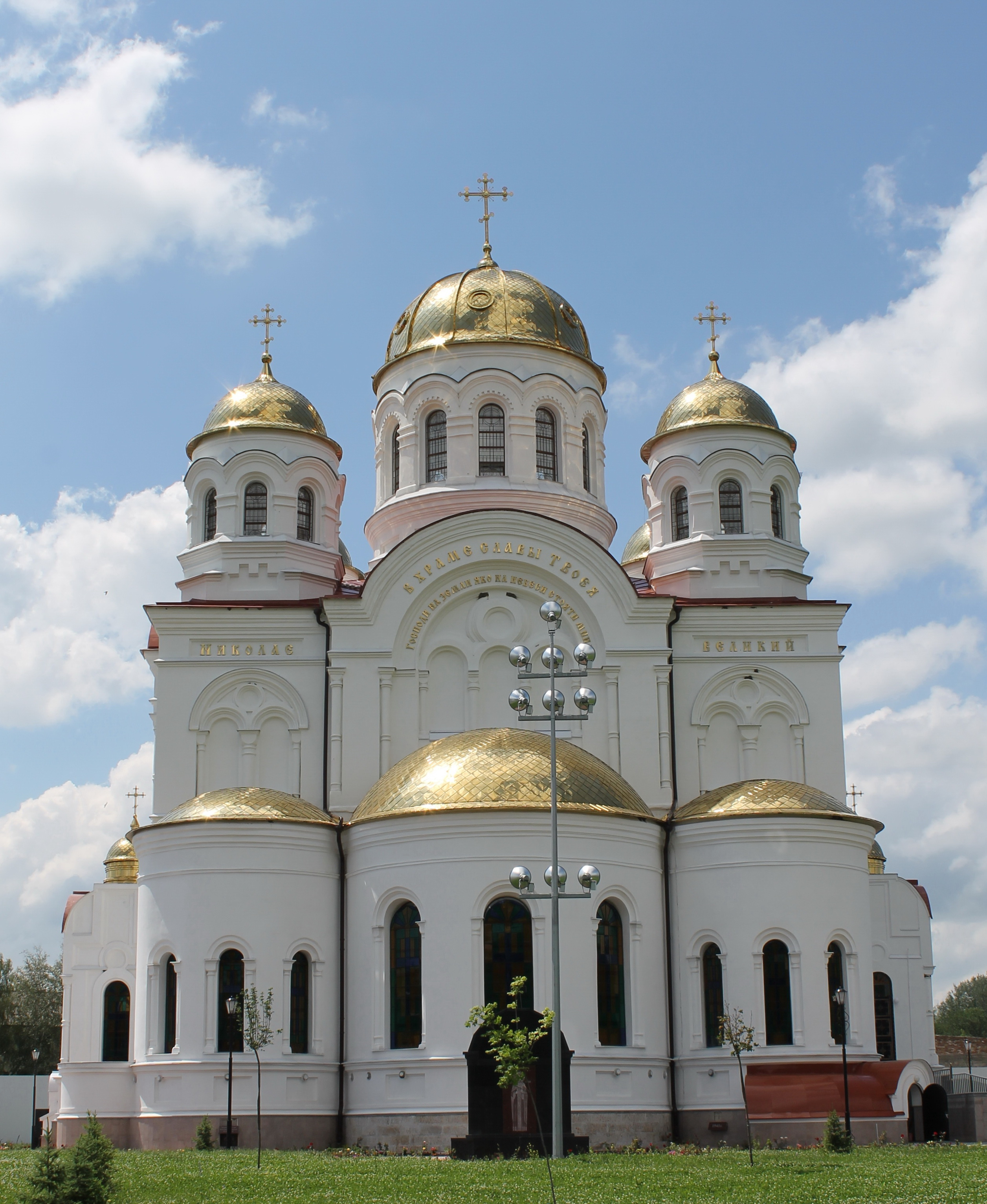 Православный Свято-Николаевский собор на территории Валуйского Успенского Николаевского мужского монастыря в городе Валуйки Белгородской области.